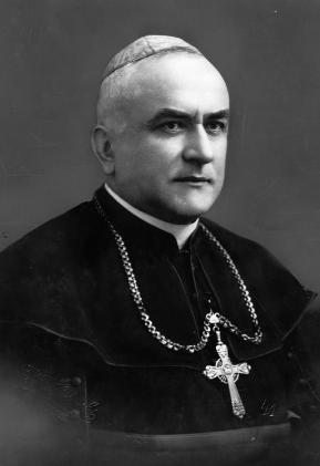 Biskup Czesław Sokołowski